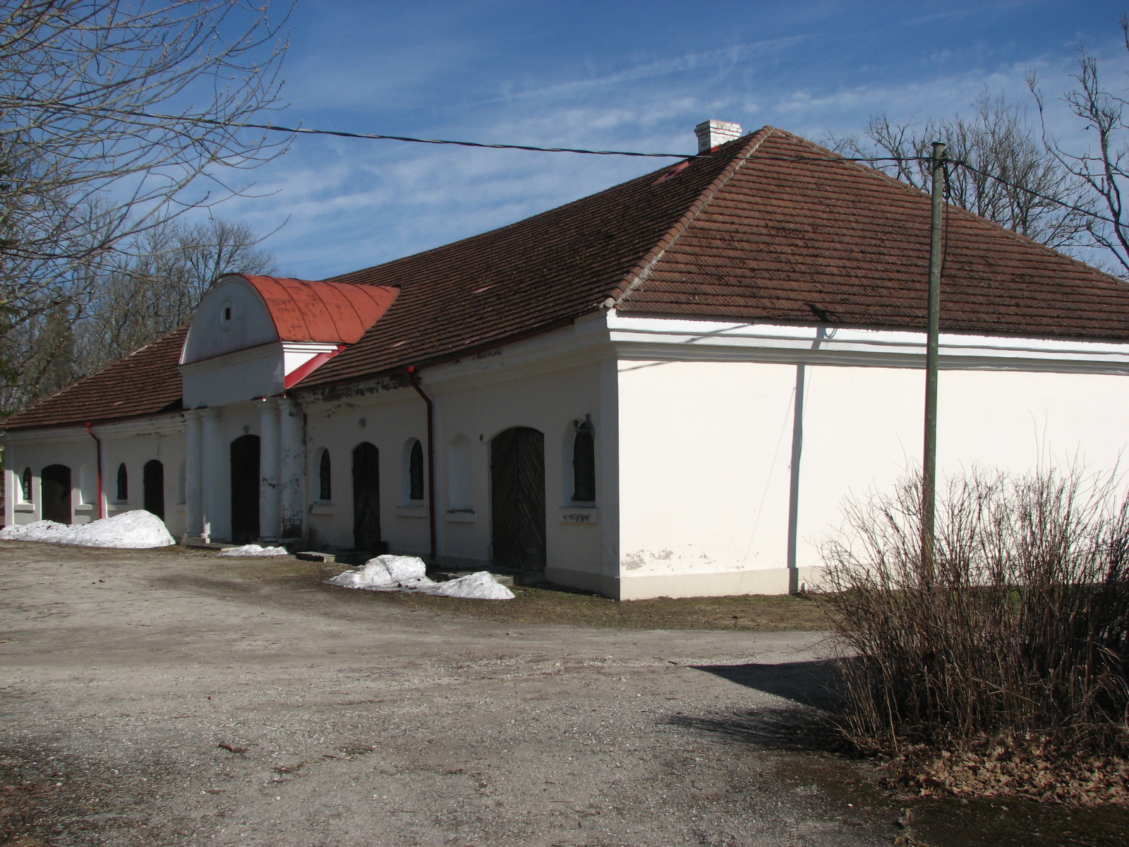 Vatla mõisa tall-tõllakuur Hanila vallas